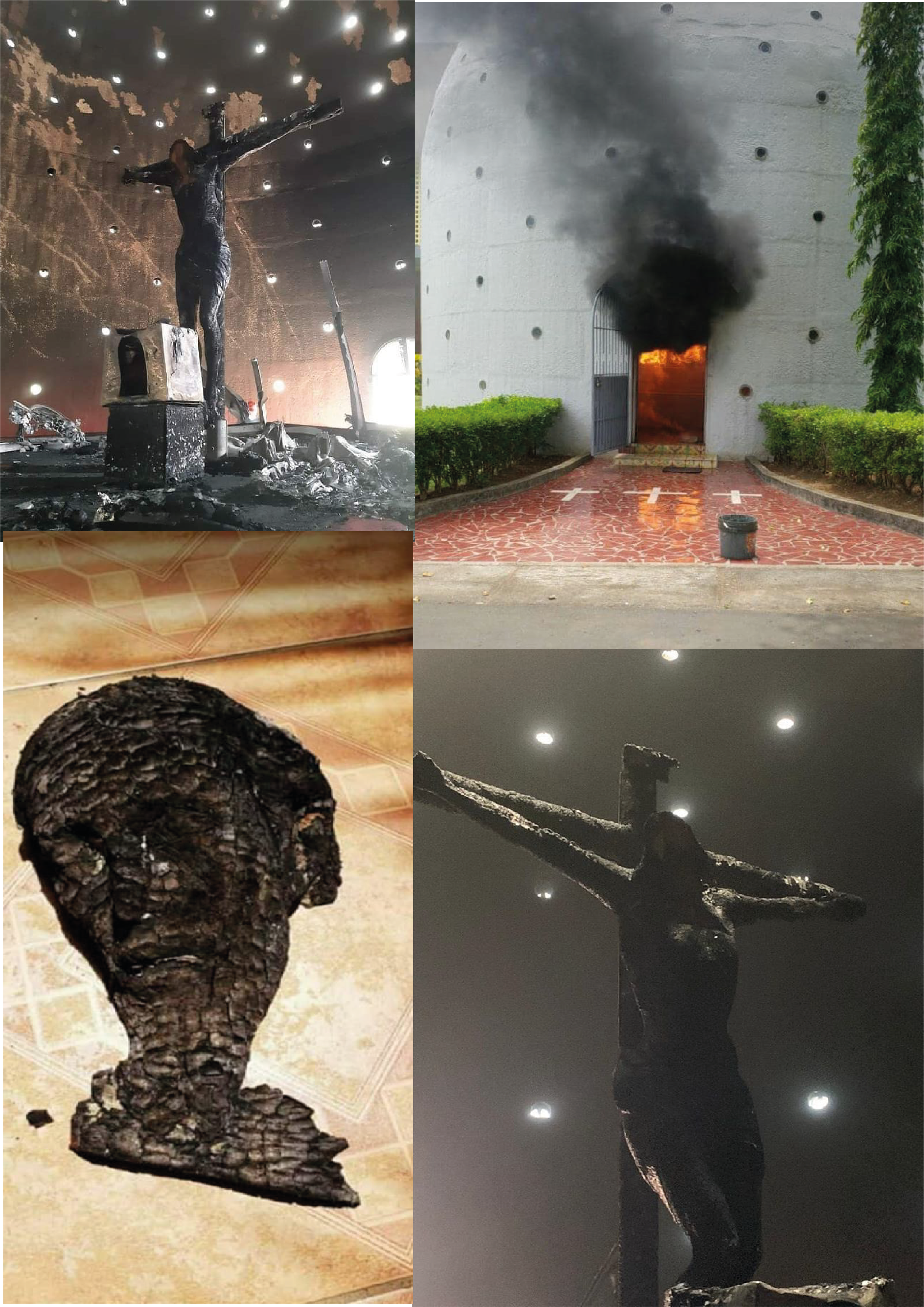 Imágenes de la Sangre de Cristo de Managua quemada el 31 de julio de 2020.